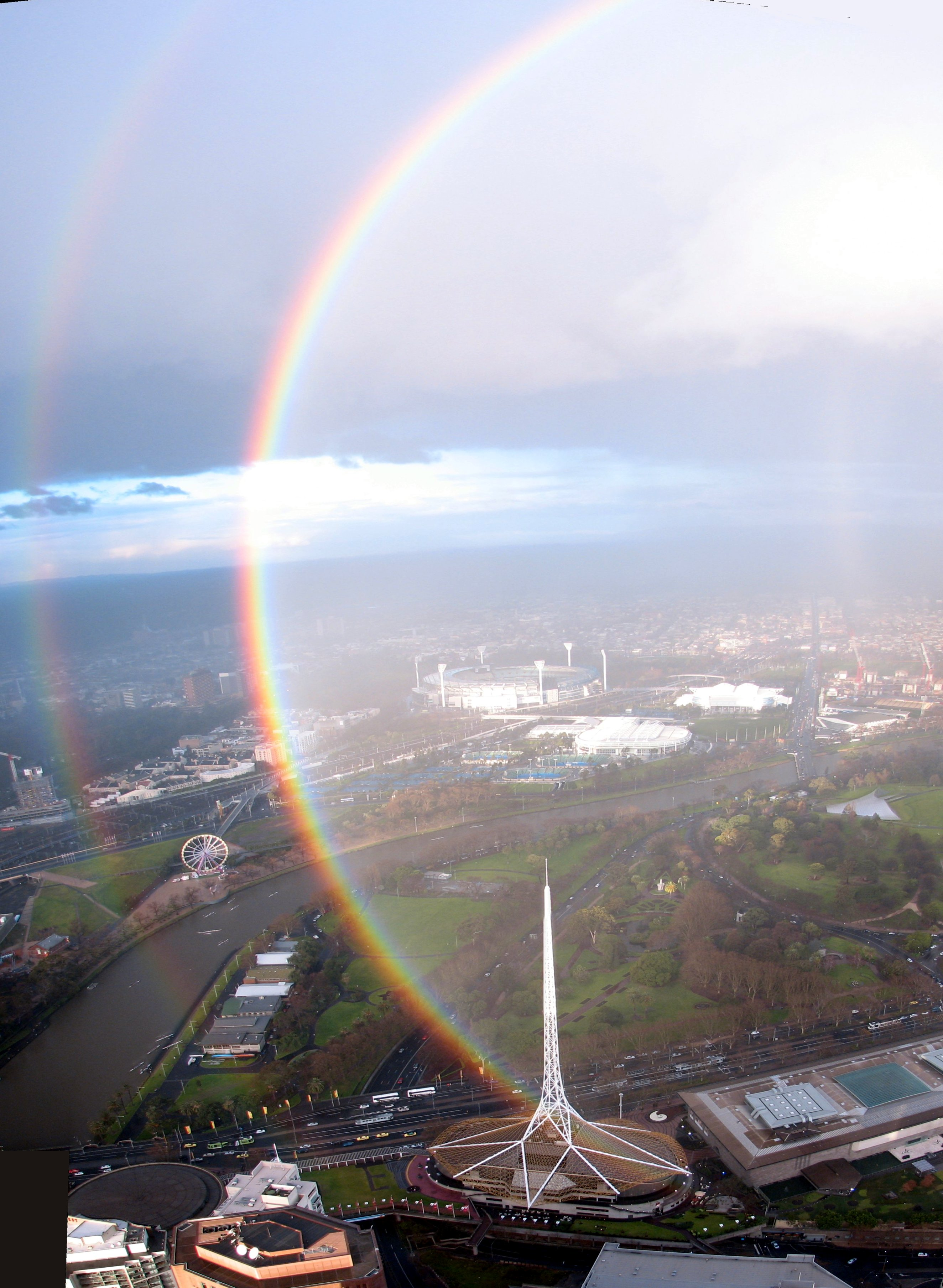 Regenbogen über Melbourne Durch die erhöhte Perspektive schliesst sich der Regenbogen gegen unten. Etwas abgeschwächt ist auch der Nebenregenbogen zu sehen. Deutlich zu erkennen ist Alexanders dunkles Band, welches den Bereich zwischen Haupt- und Nebenregenbogen abdunkelt.